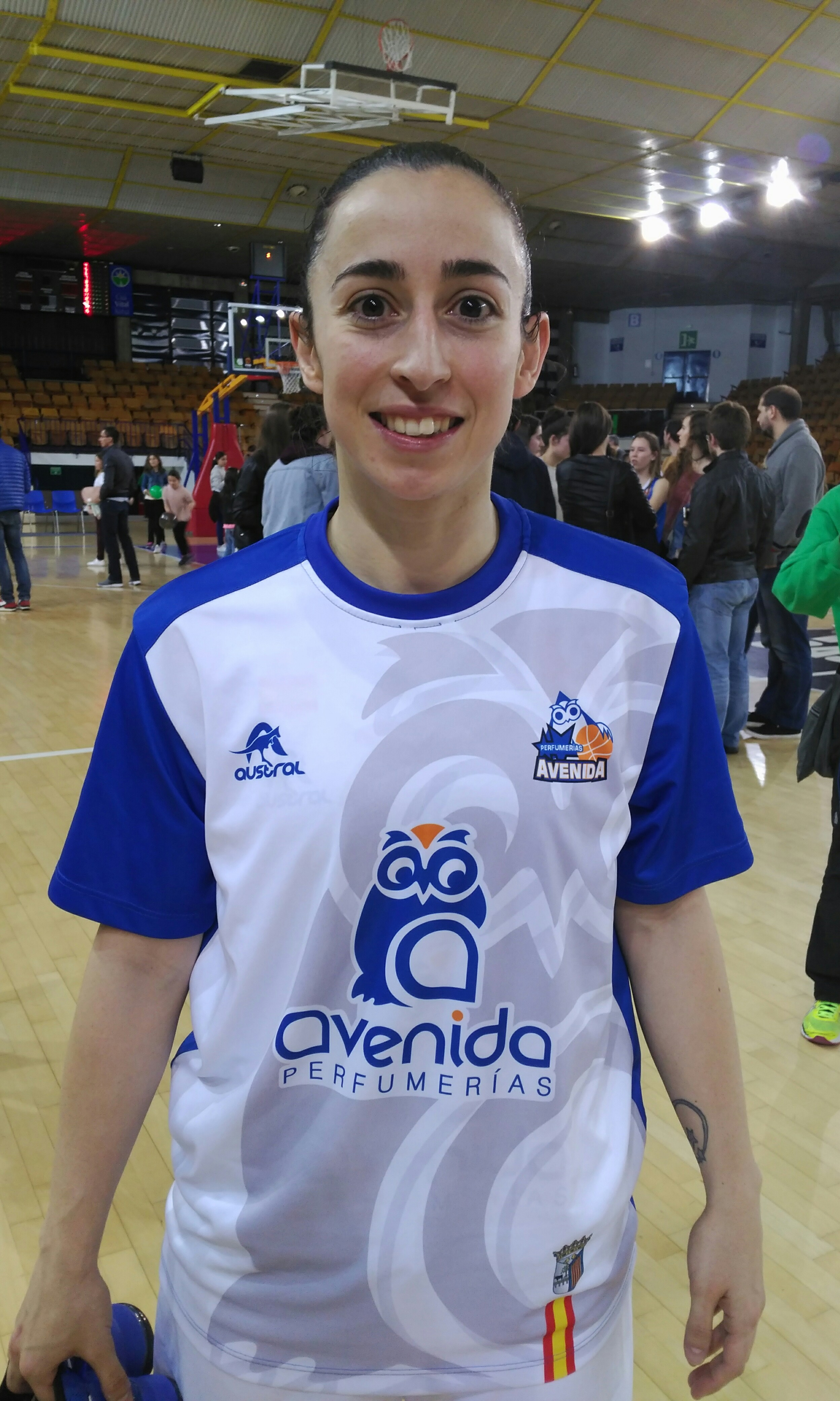 Jugadora profesional de baloncesto